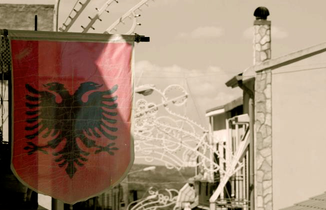 Nelle festività maggiori, specialmente nella Settimana Santa (Java e Madhe) celebrata nel rito bizantino, tradizionalmente le strade di Contessa Entellina (Kundisa) sono addobbate da bandiere albanesi, simbolo nel quale si riconosce la comunità arbèreshe. Anche lo stemma comunale di Contessa Entellina raffigura un'aquila bicipide.